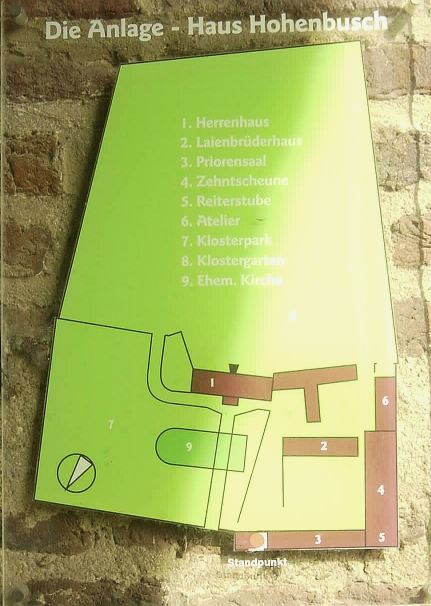 Haus Hohenbusch - Lageplan der Gebäude. öffentliche Schautafel